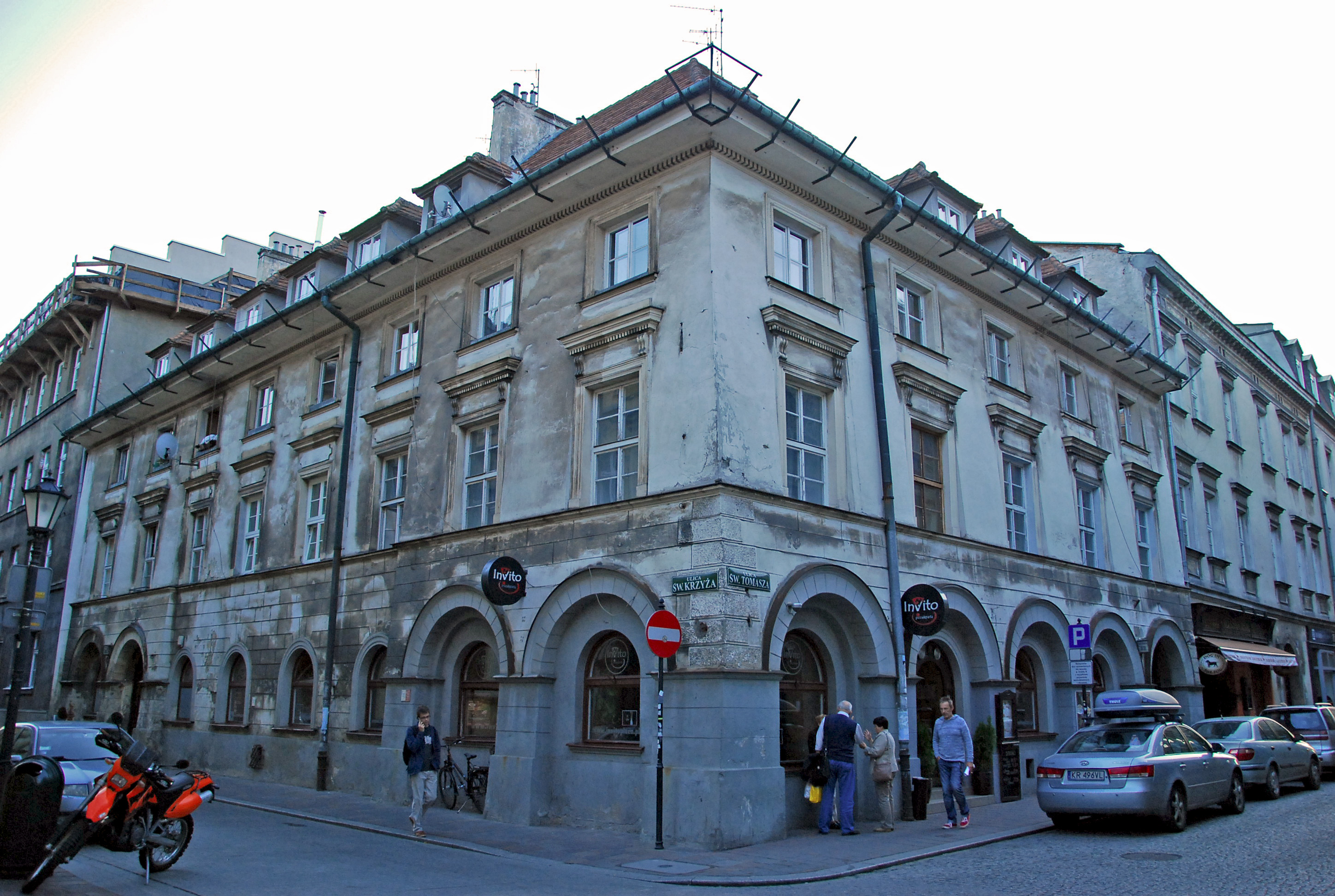 Kraków, kamienica, XIV/XV, 1823